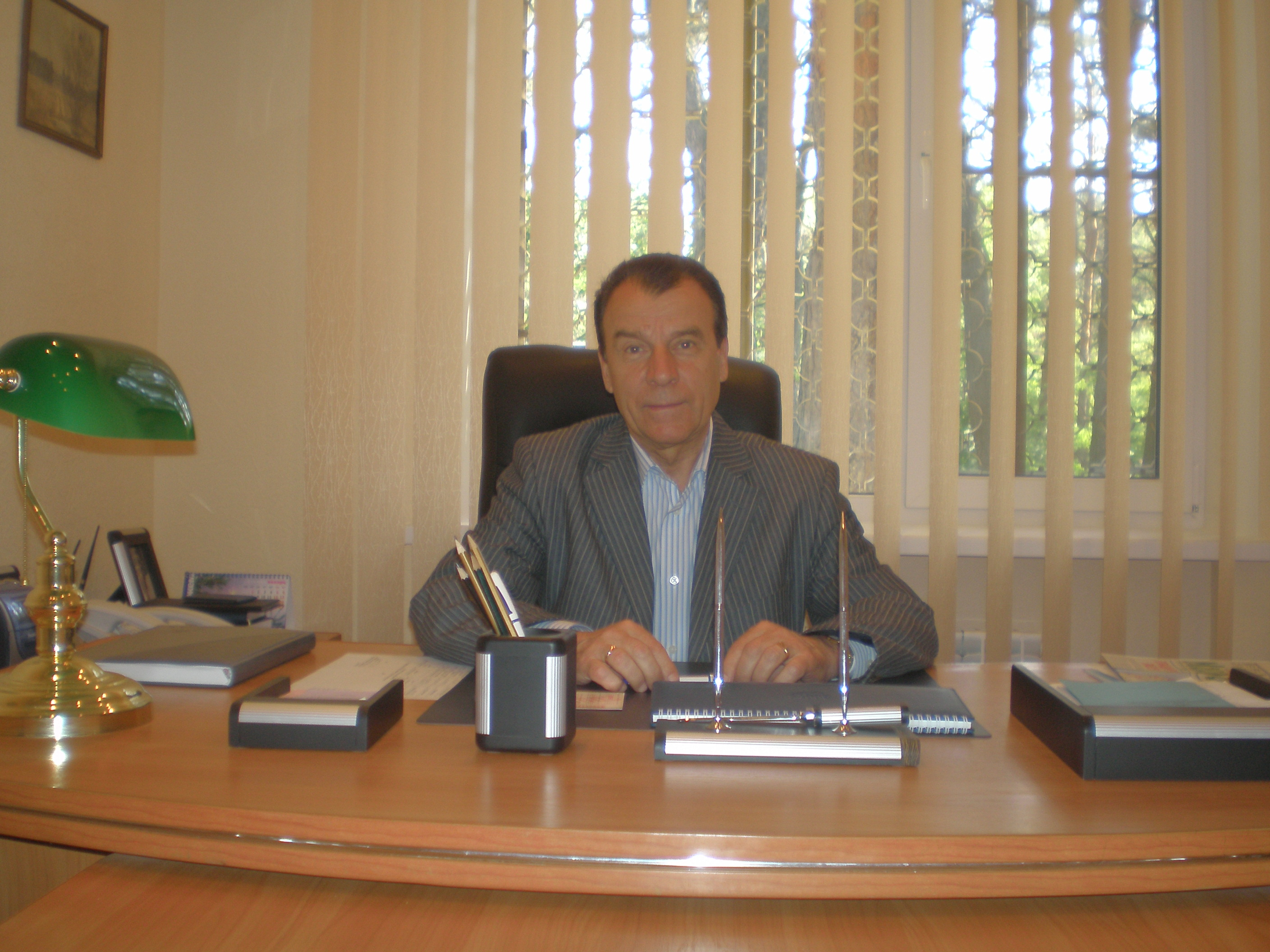 Самойлович Виктор Анатольевич